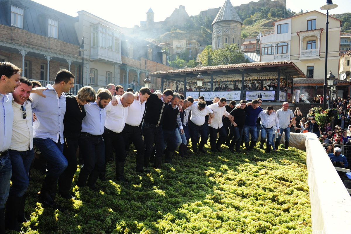 Праздник сбора урожая и города Тбилиси в первые выходные октября.